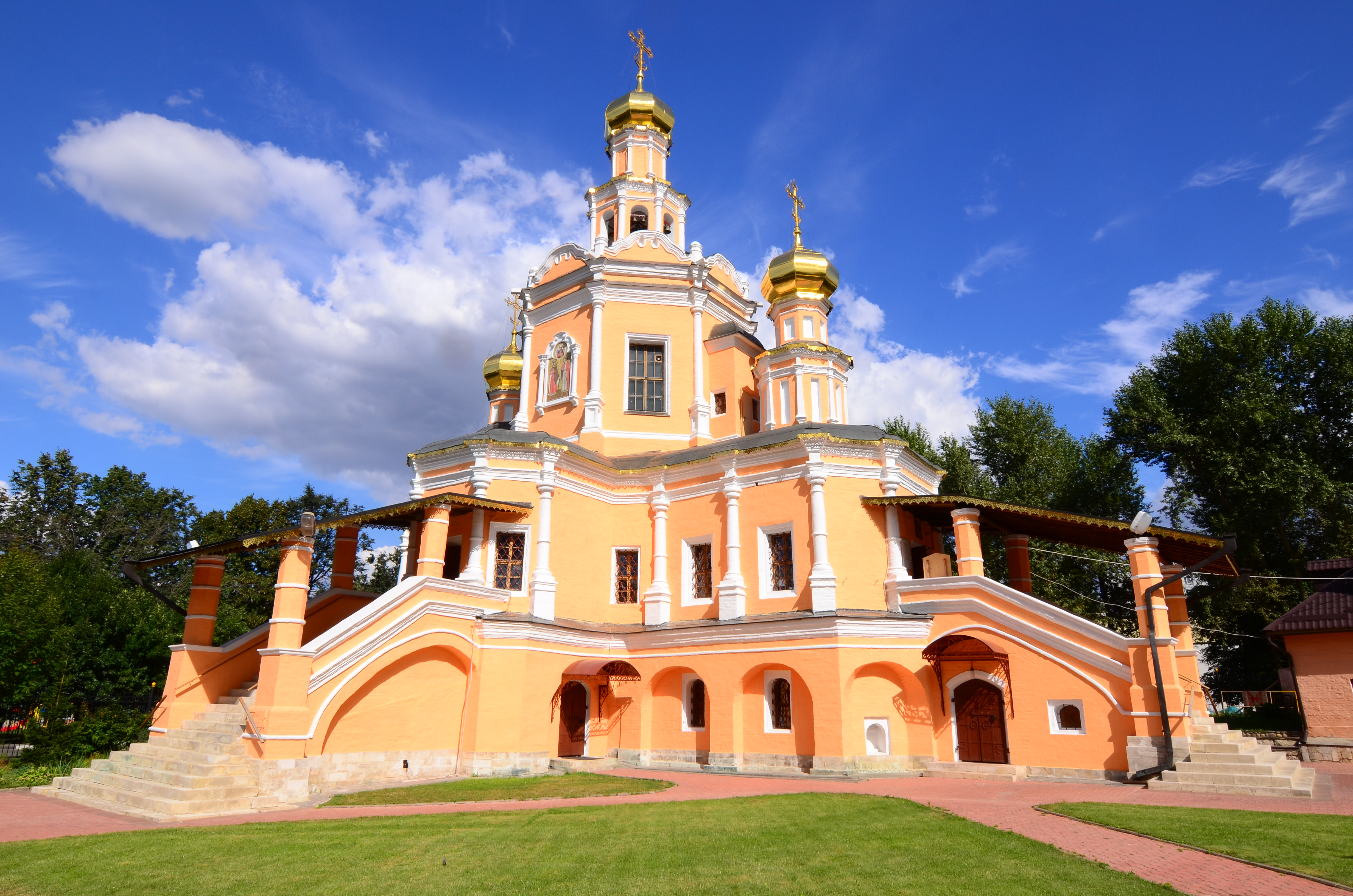 Церковь Бориса и Глеба: Перекопская ул., дом 7, строение 1, Зюзино, Юго-Западный округ, Москва